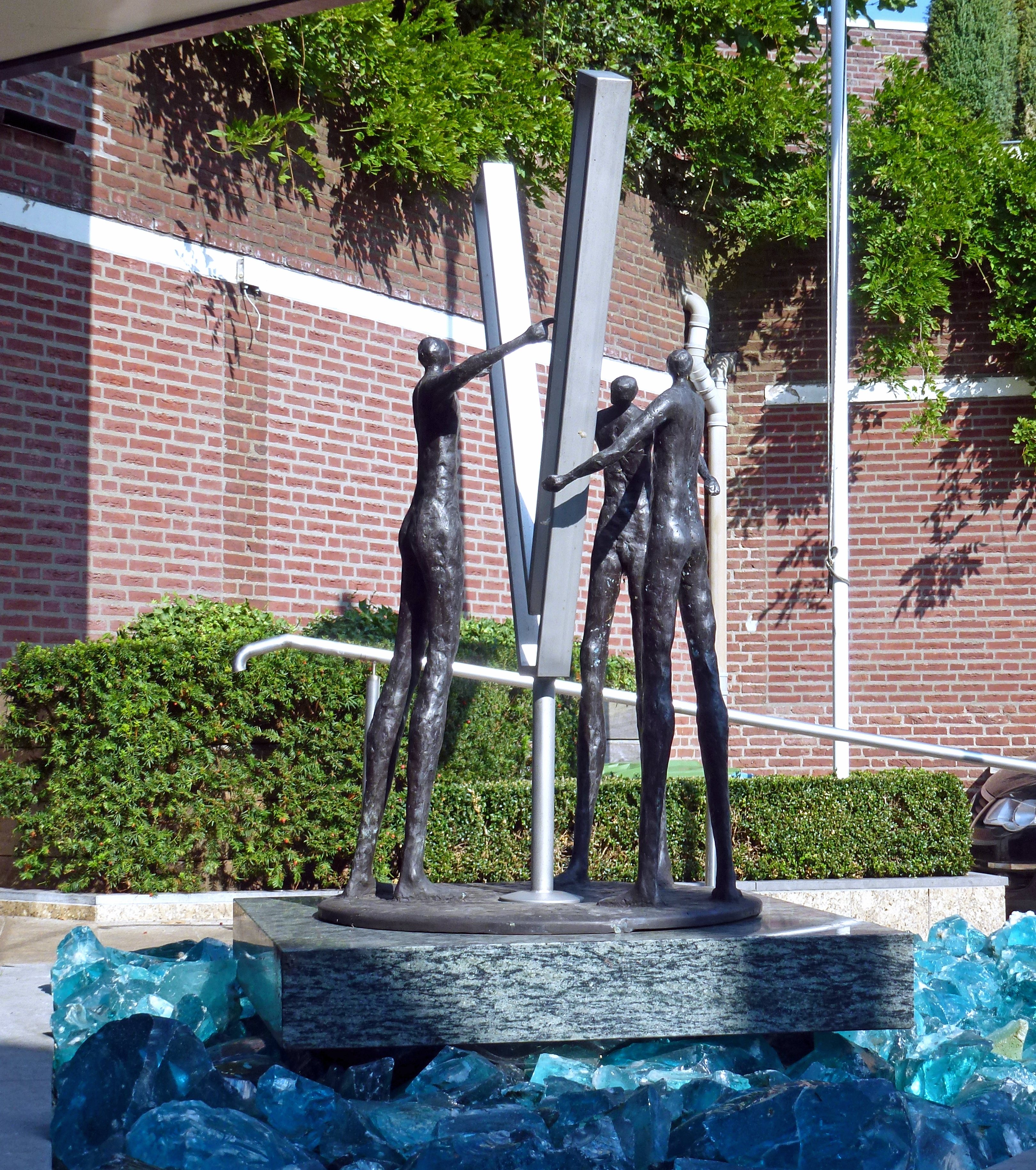 Vergeer sculptuur met de naam: Samen werken, samen uitblinken. De beeldhouwer is Theo van Eldik. Je ziet drie generaties (drie figuren) Vergeer die allen de letter V omarmen. De tekst is: 75 jaar Vergeer Kaas, aangeboden door het personeel. 1934 - 2009